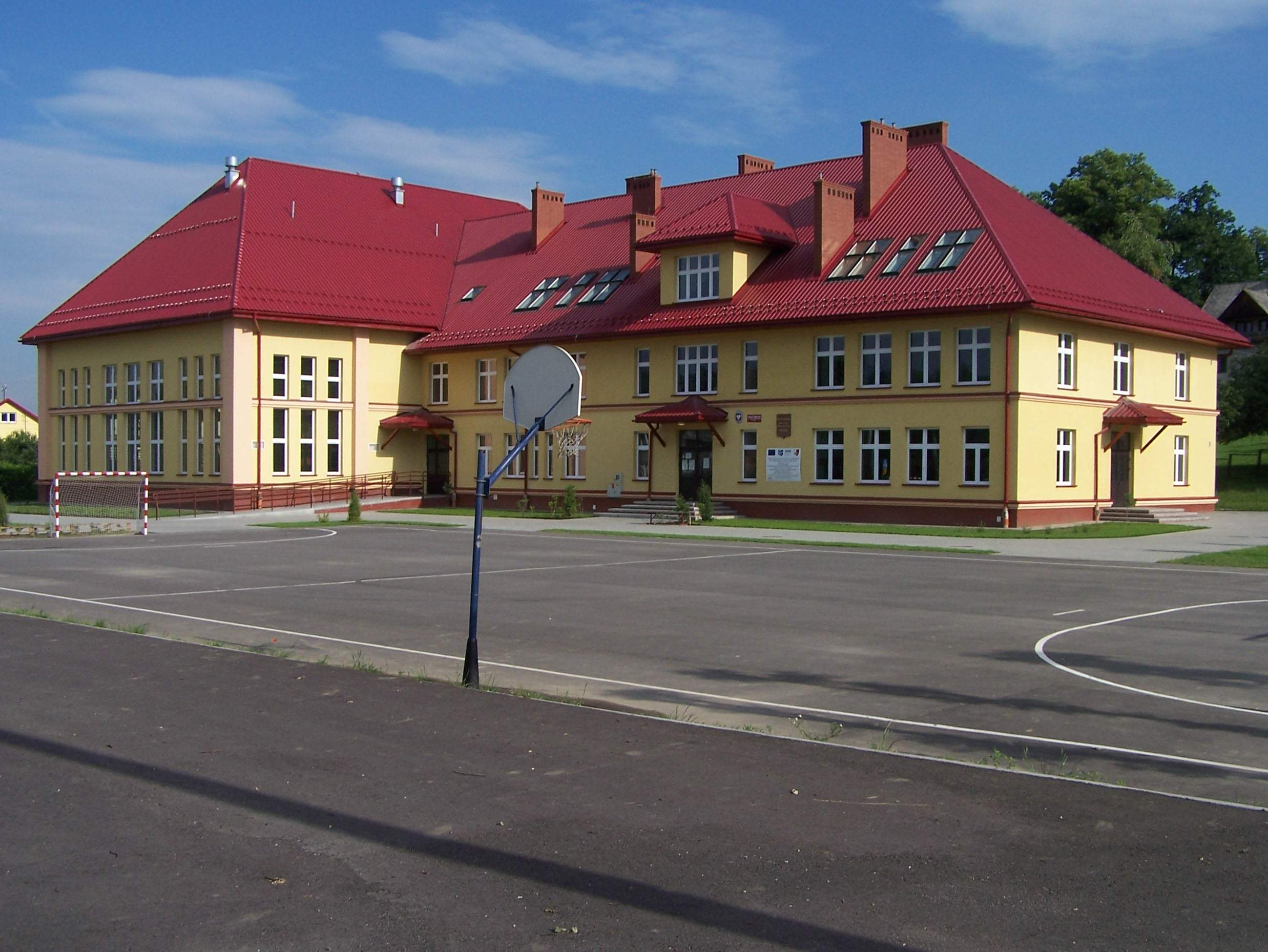 Trzciana (woj. małopolskie). Gimnazjum Publiczne